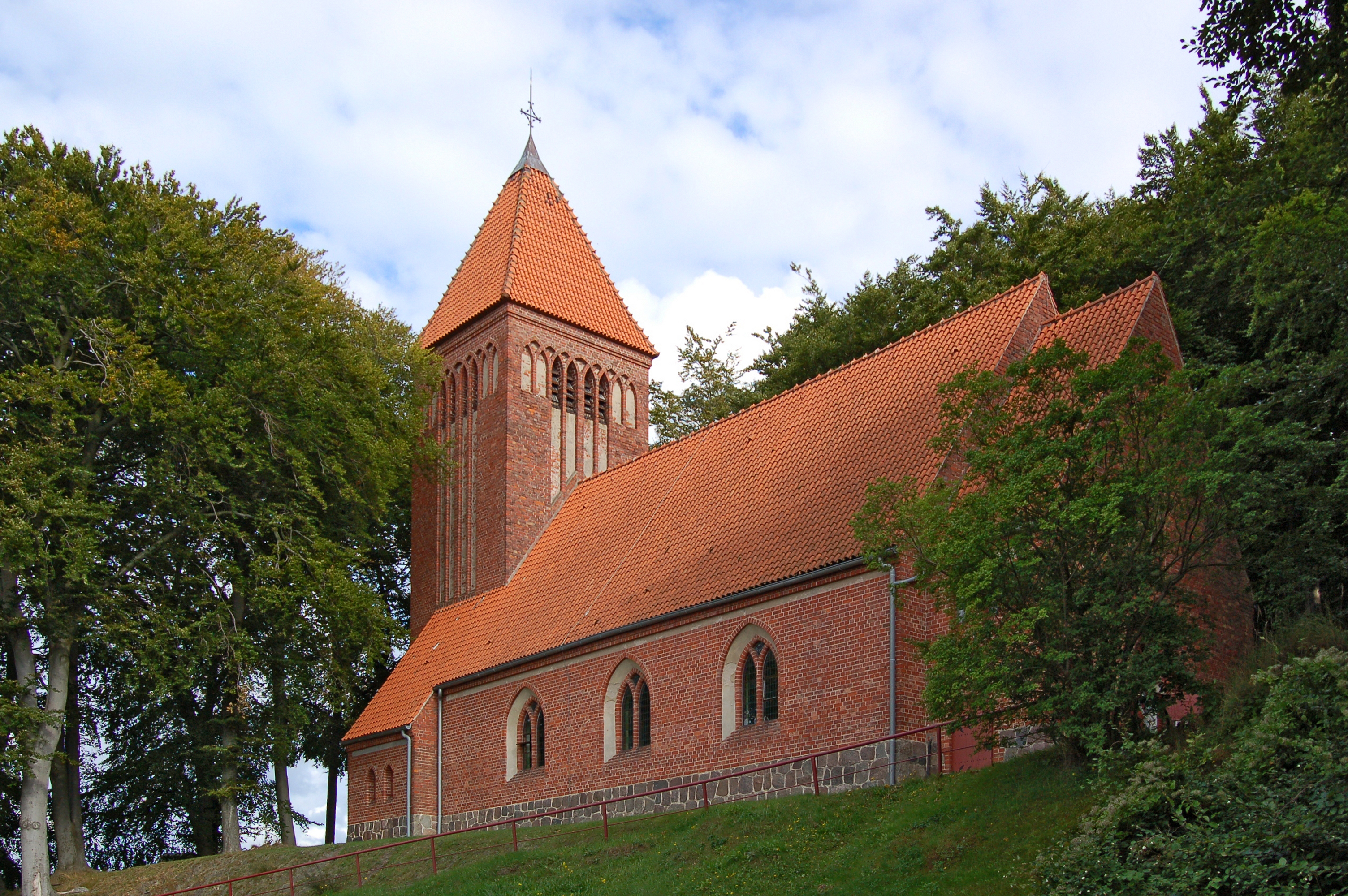 Dorfkirche Binz. Erbaut wurde die Kirche 1911 - 1913 im neugotischen Stil, unterstand der Johannis-Gemeinde in Zirkow und gehört heute zum Kirchenkreis Stralsund. Die zweimanualige Grüneberg-Orgel wurde im Jahr 1913 eingebaut und 1985 und 2000 restauriert. In Bochum wurden die Glocken gegossen.